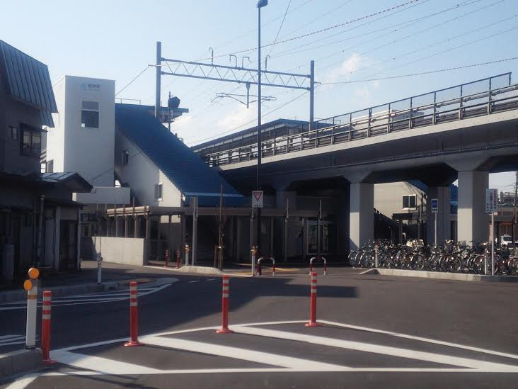 筒井駅（2014年5月）